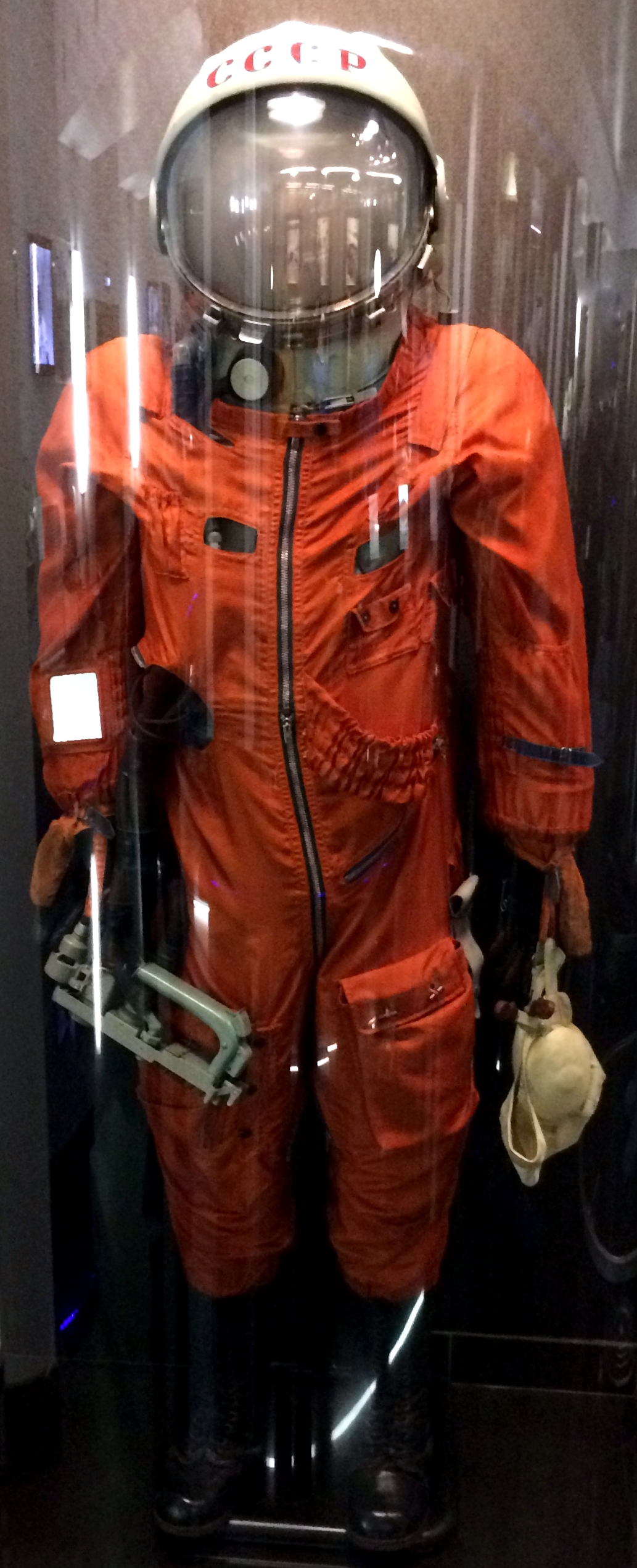 Скафандр в котором Ю. А. Гагарин был в космосе.